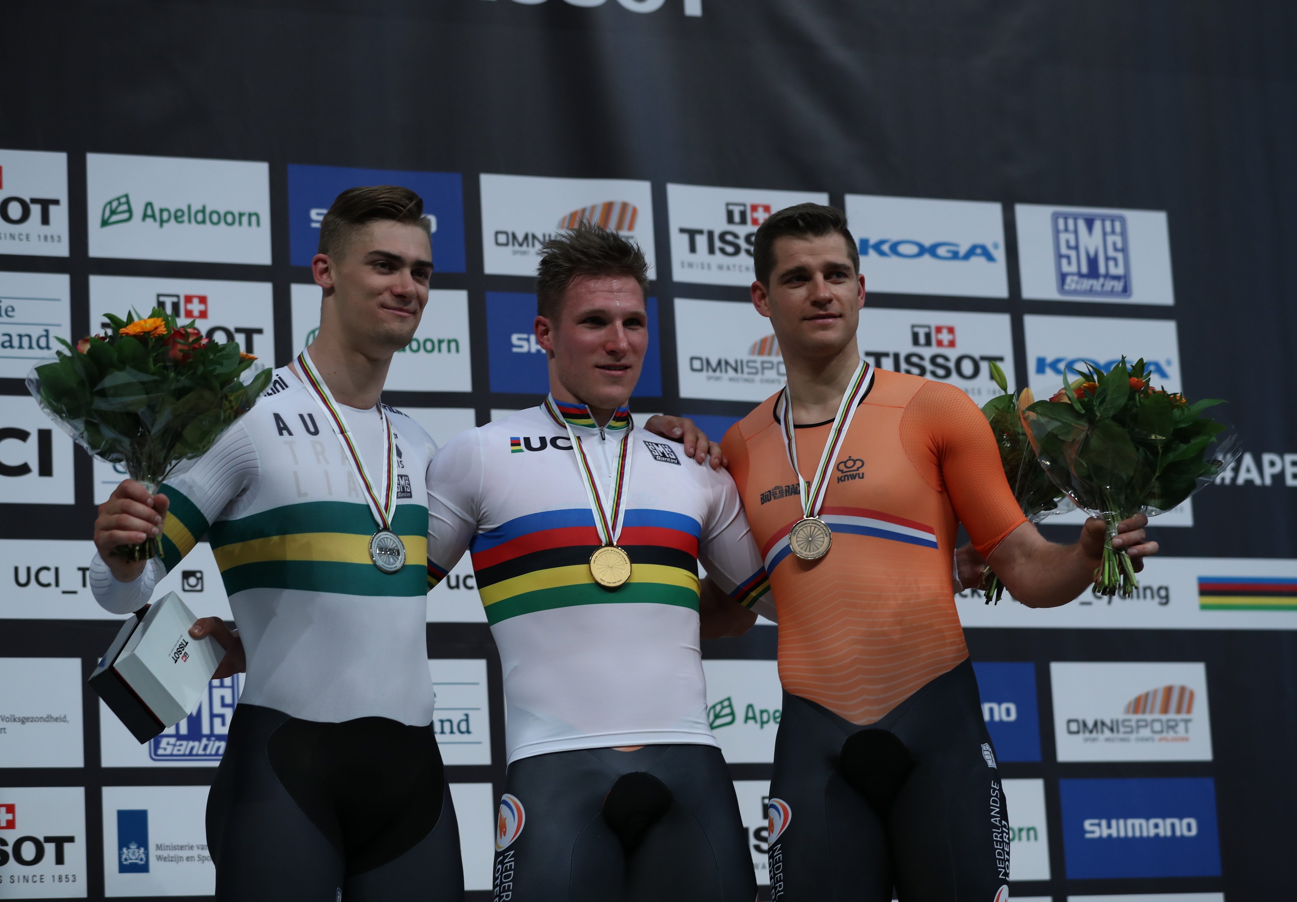 Podium 1000m (v.l.n.r.): Matthew Glaetzer, Jeffrey Hoogland, Theo Bos